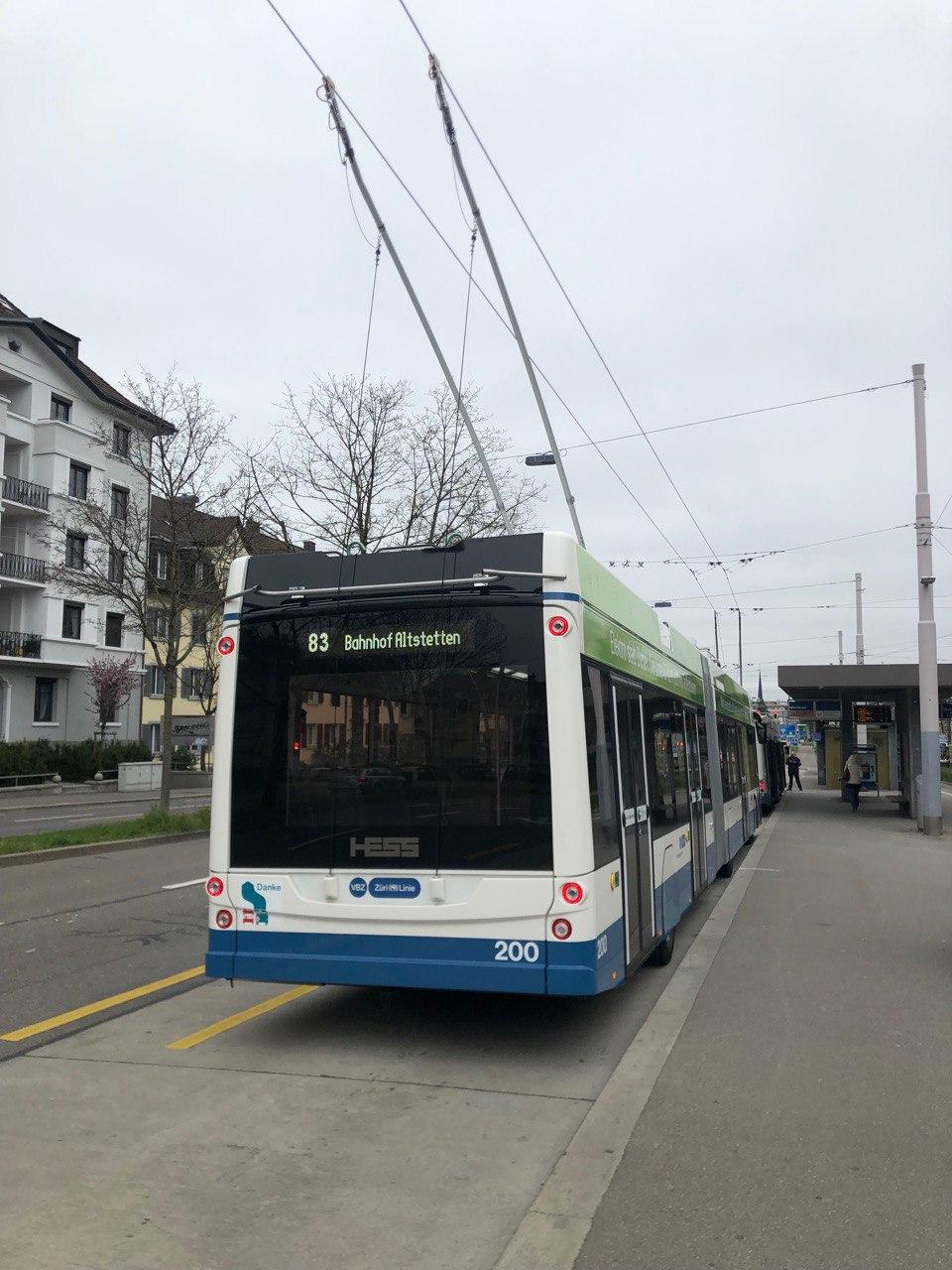 Das neue Fahrzeug bewirbt die Umstellung der Linie 83 auf Trolleybusse